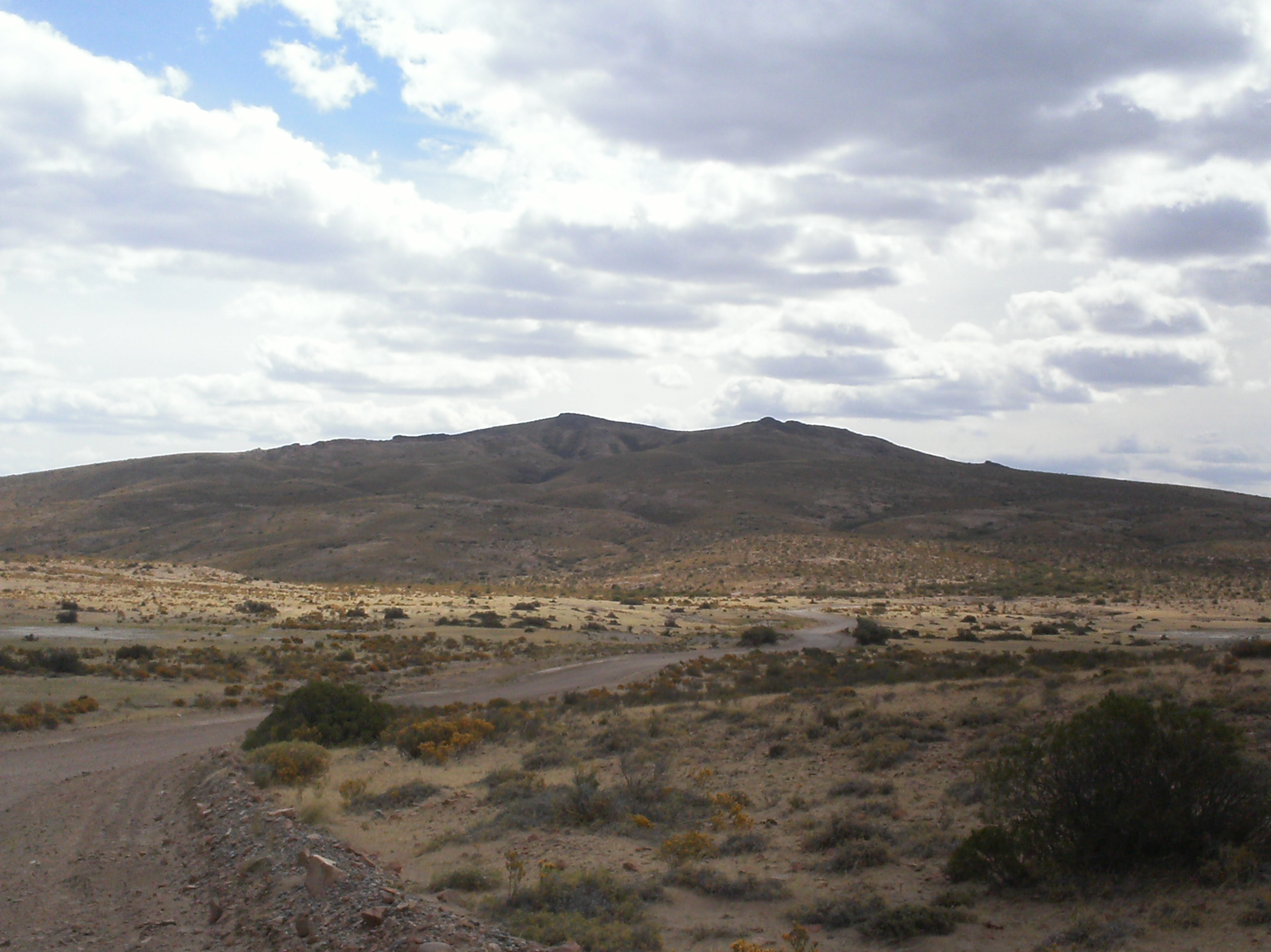 Loma cercana a Camarones, Pcia. de Chubut.